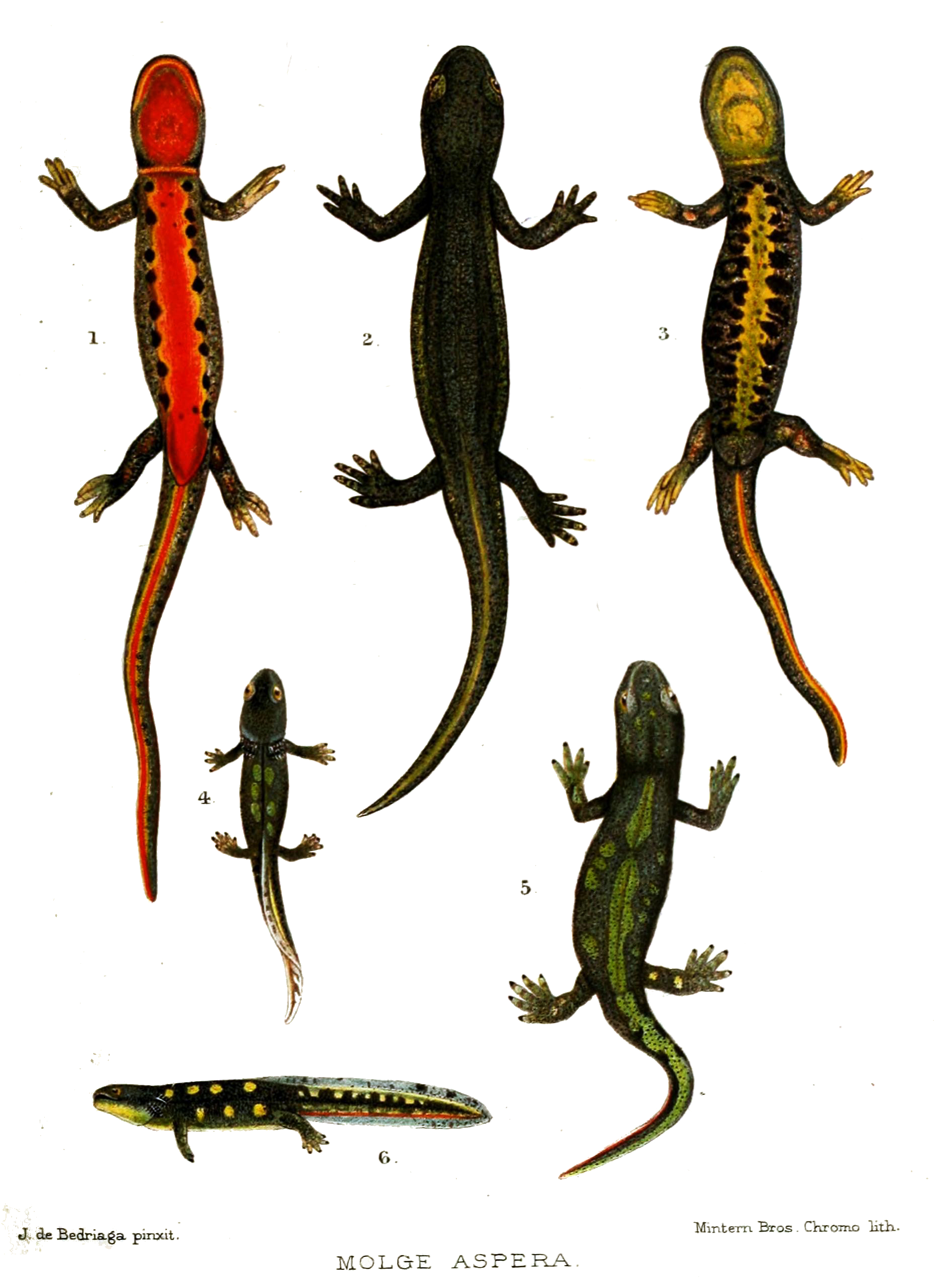 Calotriton asper (Molge aspera)